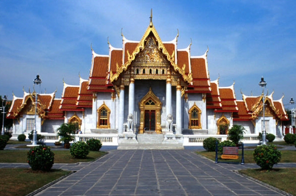 Wat Benchamabophit (Temple de Marbre) Auteur: Louis Paquet = User:NamKhaeng